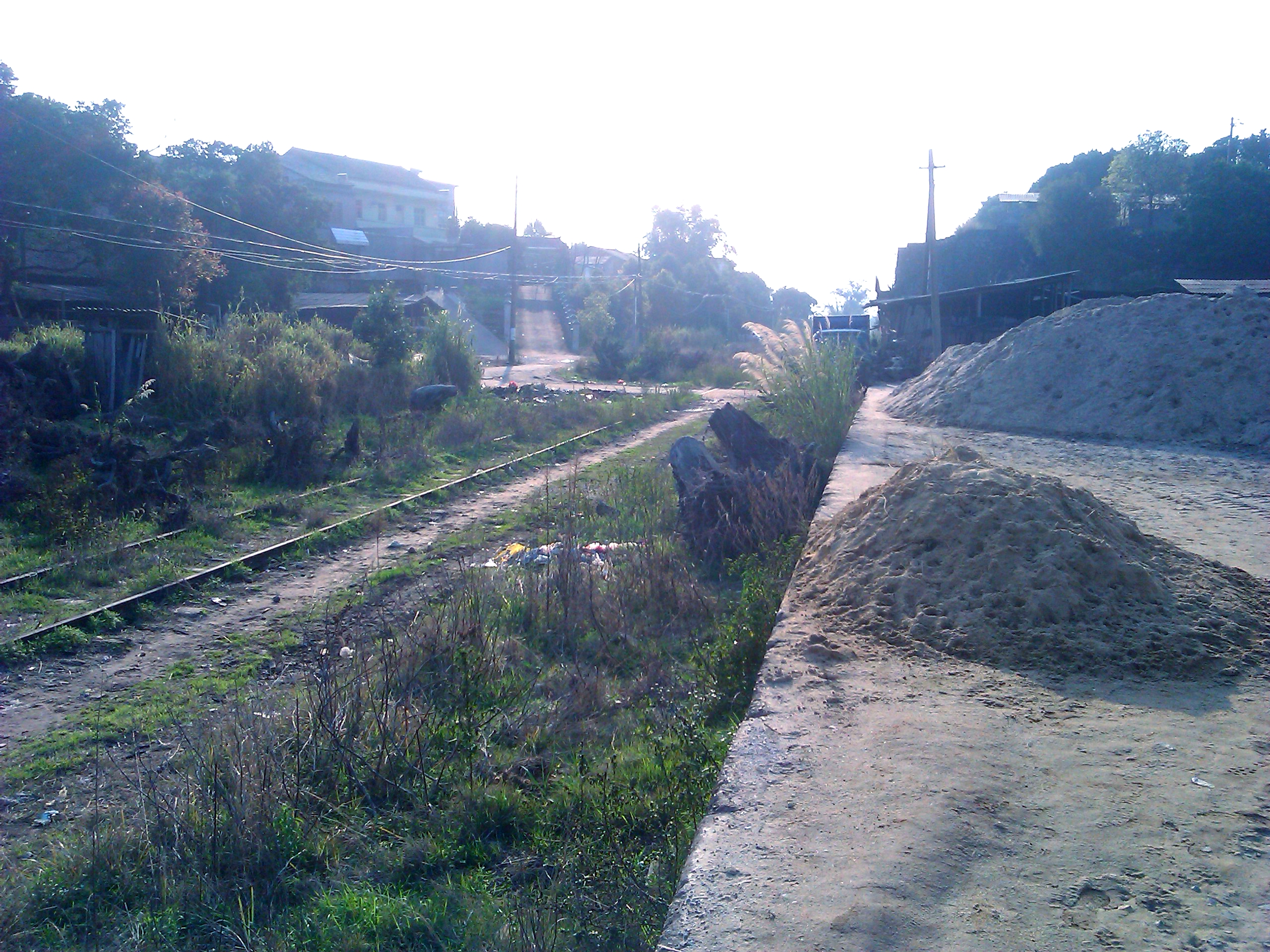 中文（中国大陆）: 被放弃的桂林大圩火车站